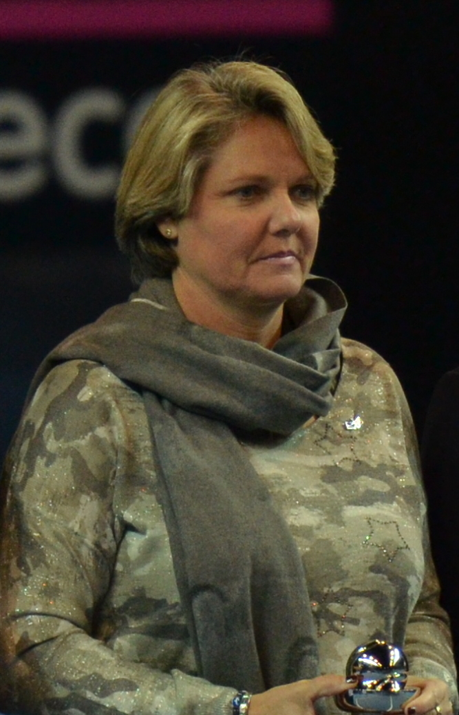 PPP_3181